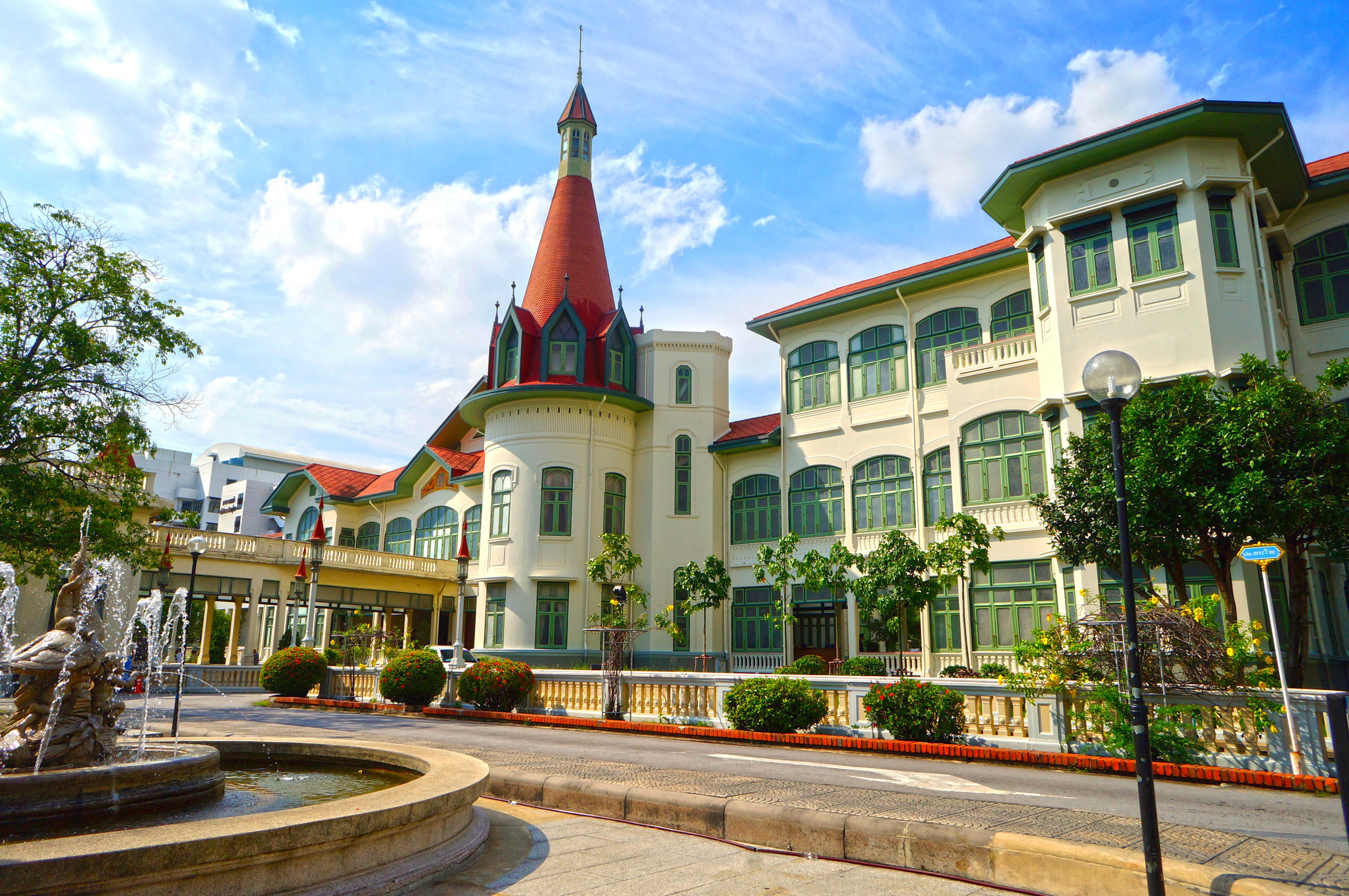 โรงพยาบาลพระมงกุฎเกล้า(วังพญาไท)